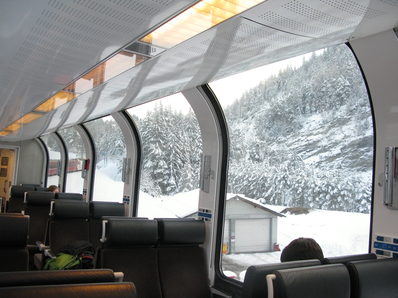 Rhätische Bahn Panoramawagon (bernina express), Graubünden